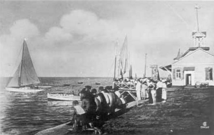 Таганрог Яхт-клуб 1936